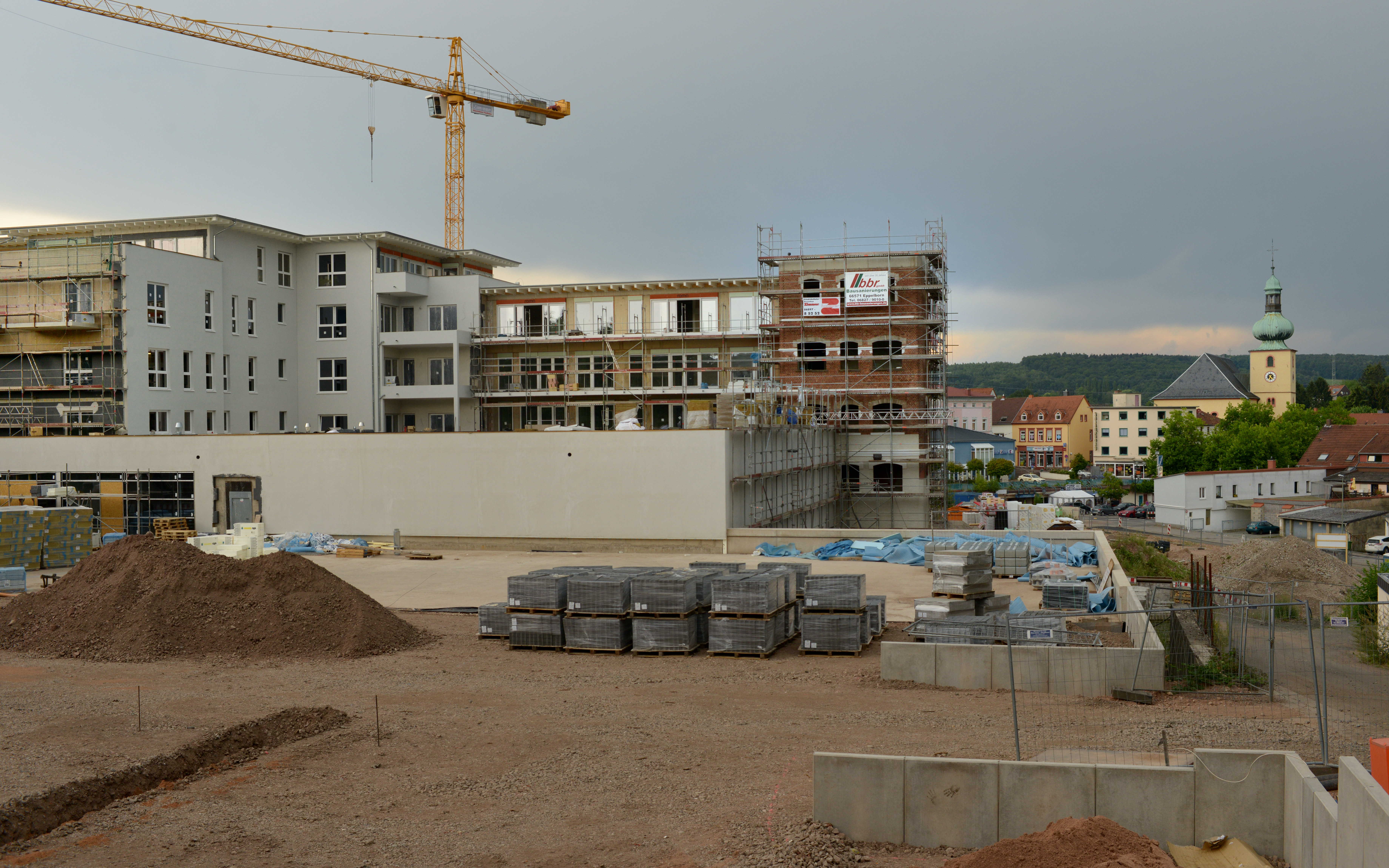 Baustelle der Brauturmgalerie in Illingen, Landkreis Neunkirchen, Saarland, auf dem ehemaligen Höll-Gelände, Höll Feine Fleisch- und Wurstwaren GmbH (2018).